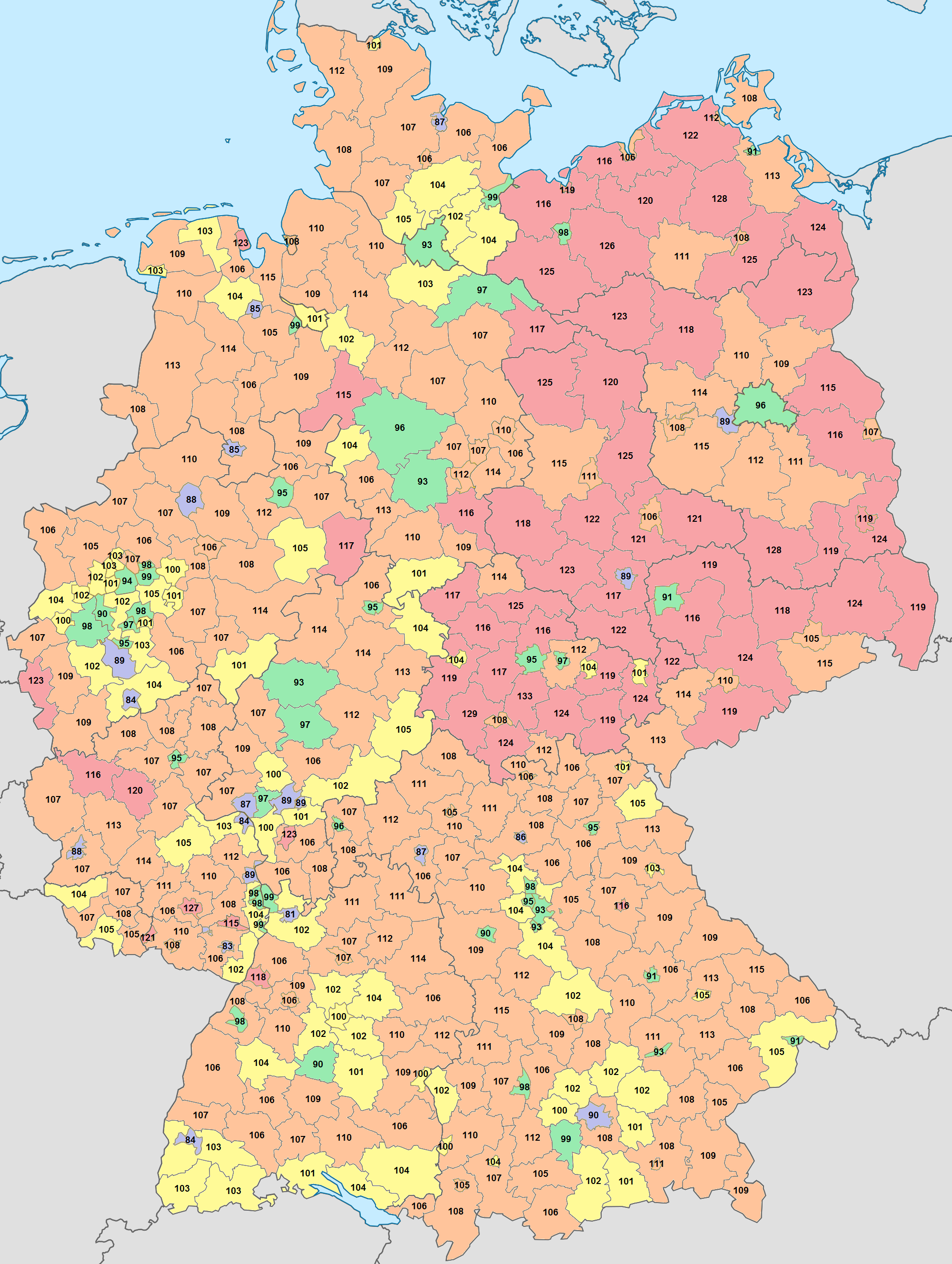 Die Karte zeigt die Geschlechterverteilung in Deutschland auf Ebene der Landkreise für die Altersklasse der 18- bis 29-Jährigen (kommende Elterngeneration). Die Werte geben an, wieviele Männer auf jeweils 100 Frauen diesen Alters im Landkreis entfallen. Rot sind Werte über 115,0 Männern pro 100 Frauen, orange zwischen 105,0 und 115,0, gelb zwischen 100,0 und 105,0, grün zwischen 90,0 und 100,0 und blau unter 90,0 Männer pro 100 Frauen. Die Daten beziehen sich auf den Zensus 2011; der Durchschnittswert dieser Altersklasse für Deutschland lag bei 103,4 Männern pro 100 Frauen.